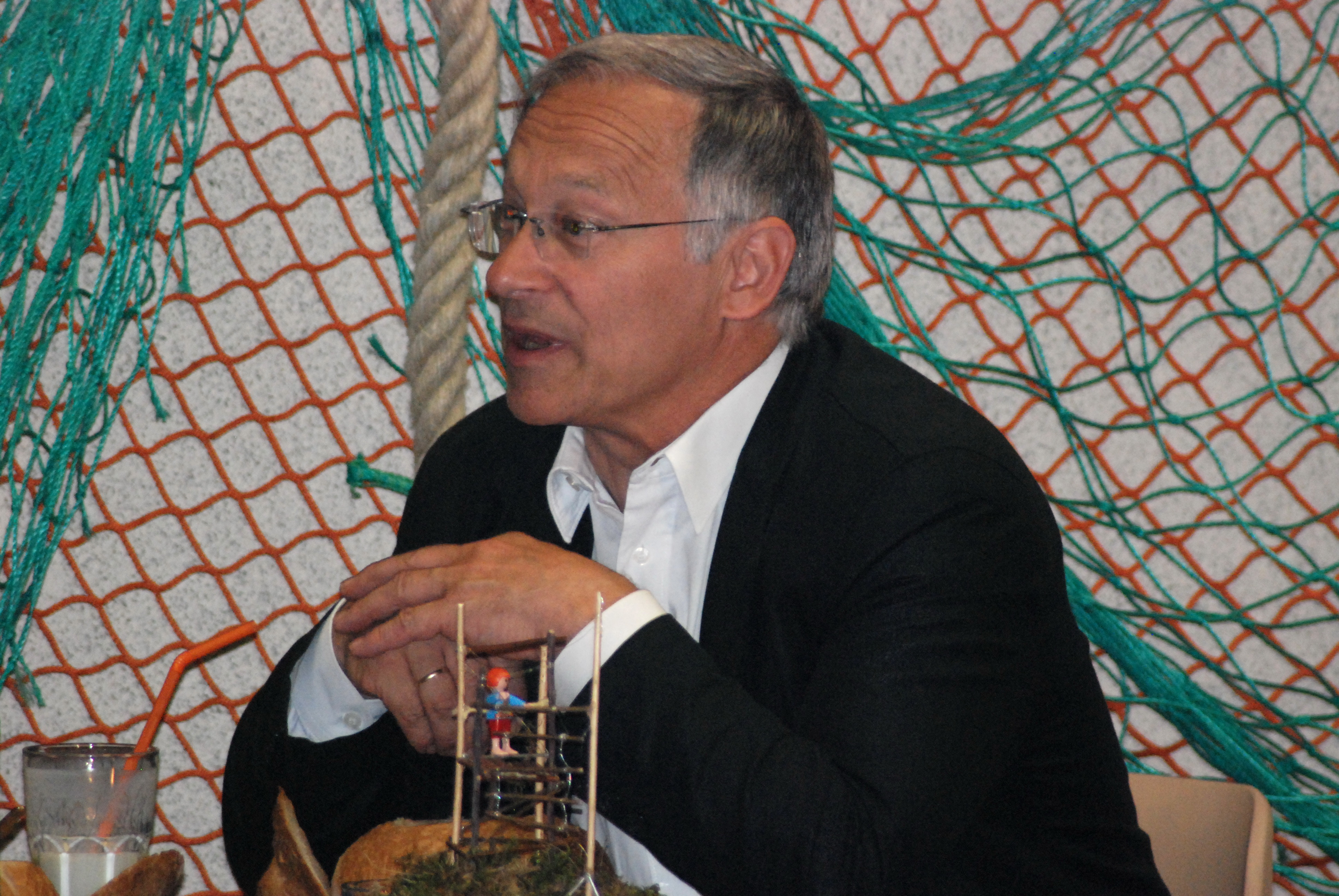 Martin Patzelt (CDU), Oberbürgermeister der Stadt Frankfurt (Oder) (voraussichtlich bis ins Jahr 2010)